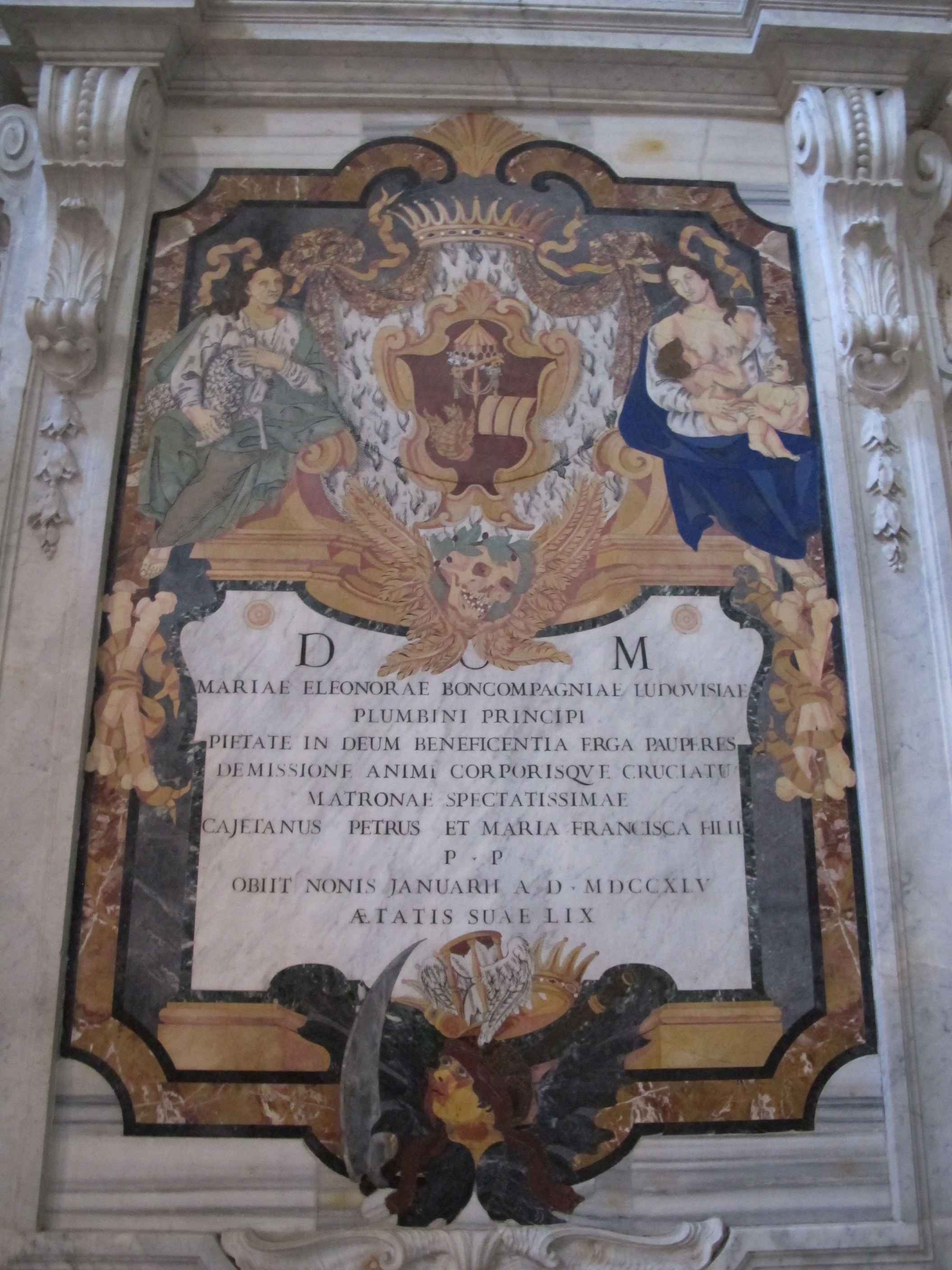 Santa maria del popolo, monum a maria eleonora boncompagni ludovisi